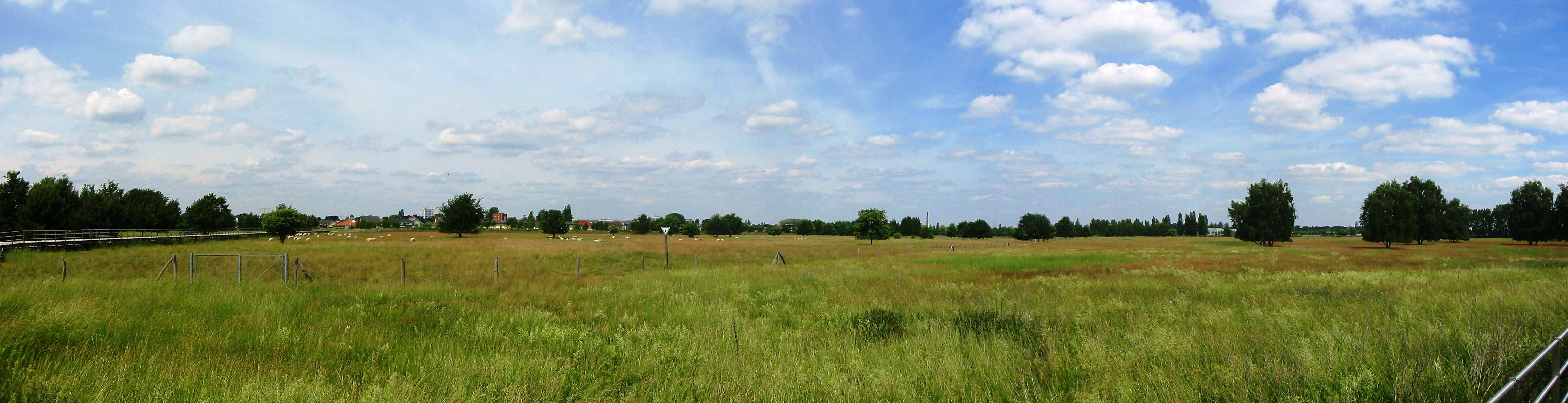 Panoramablick über den Landschaftspark Johannisthal/Adlershof (ehemaliges Flugfeld) in Berlin-Johannisthal; Zentralfläche NSG 35 „Ehemaliges Flugfeld Johannisthal“